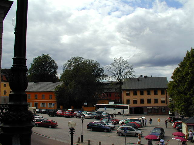 S:t Eriks torg mot norr